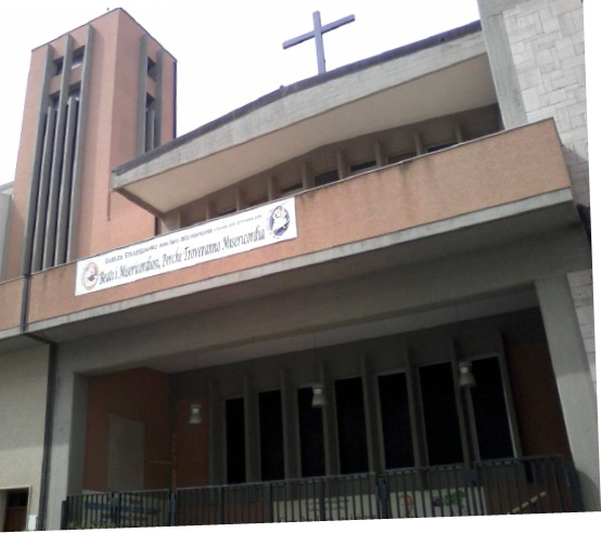 Chiesa Anime Sante (Alcamo): facciata